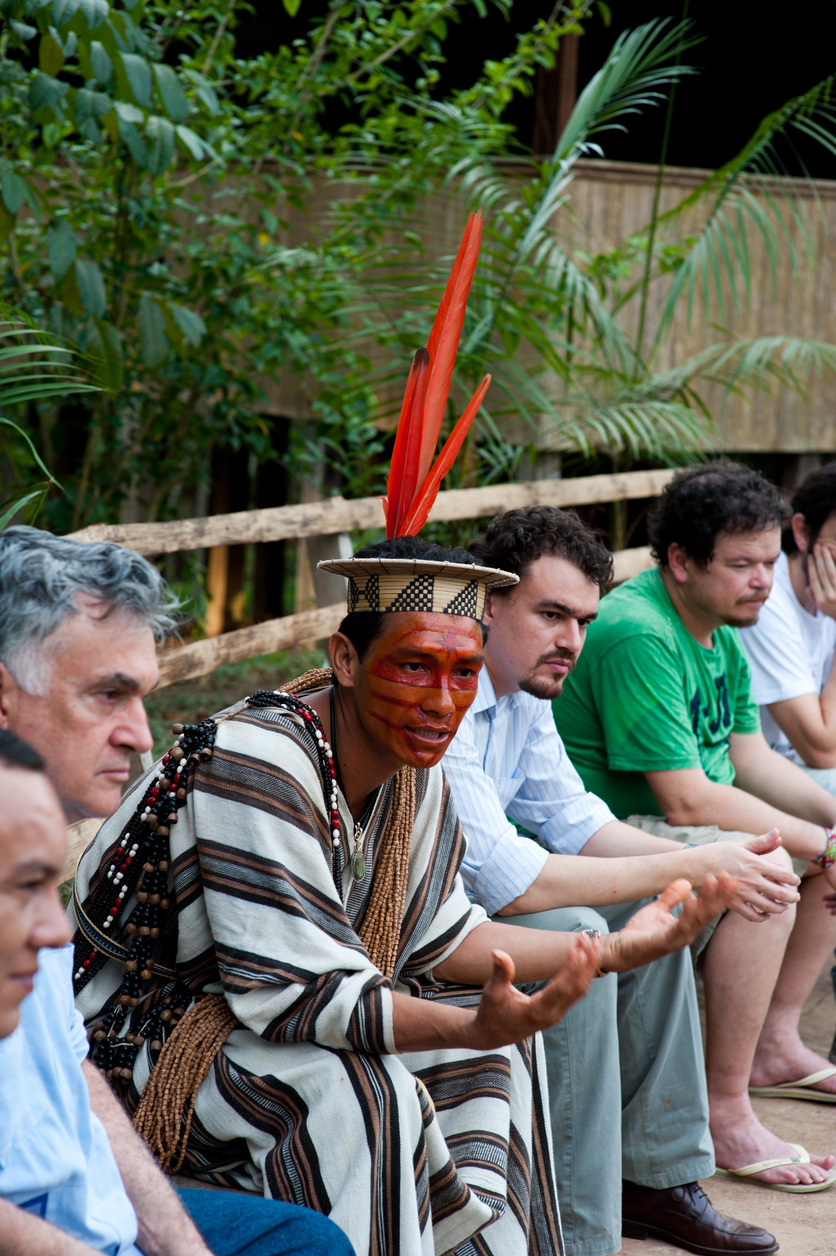 Ministro da Cultura, Juca Ferreira, visitou o Centro Yorenka Ãtame, em Marechal Thaumaturgo no estado do Acre e participou de uma roda de conversa com representantes do Governo do Acre e Líderes Indígenas © Pedro França/MinC